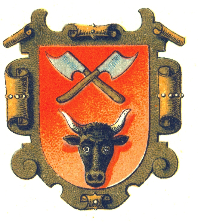 Zunftwappen Schlächter